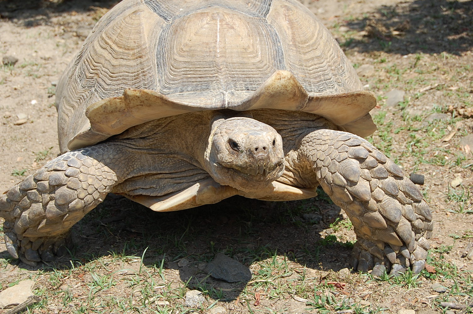 William, Sulcata de la Vallée des Tortues